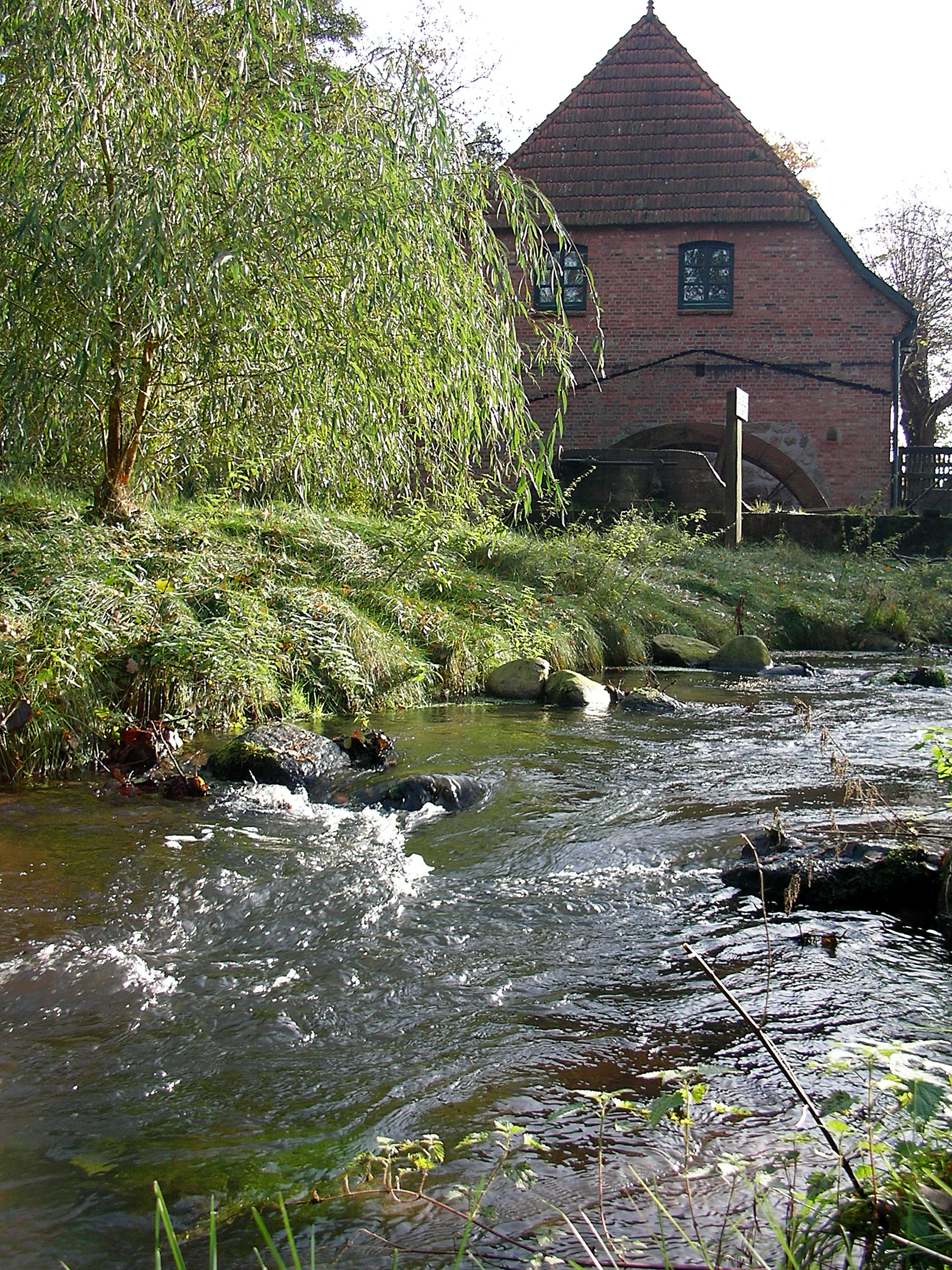 Holmer Mühle, Buchholz